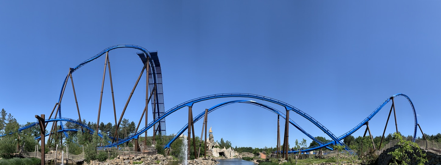 Panoramasicht auf die Stahlachterbahn Fēnix